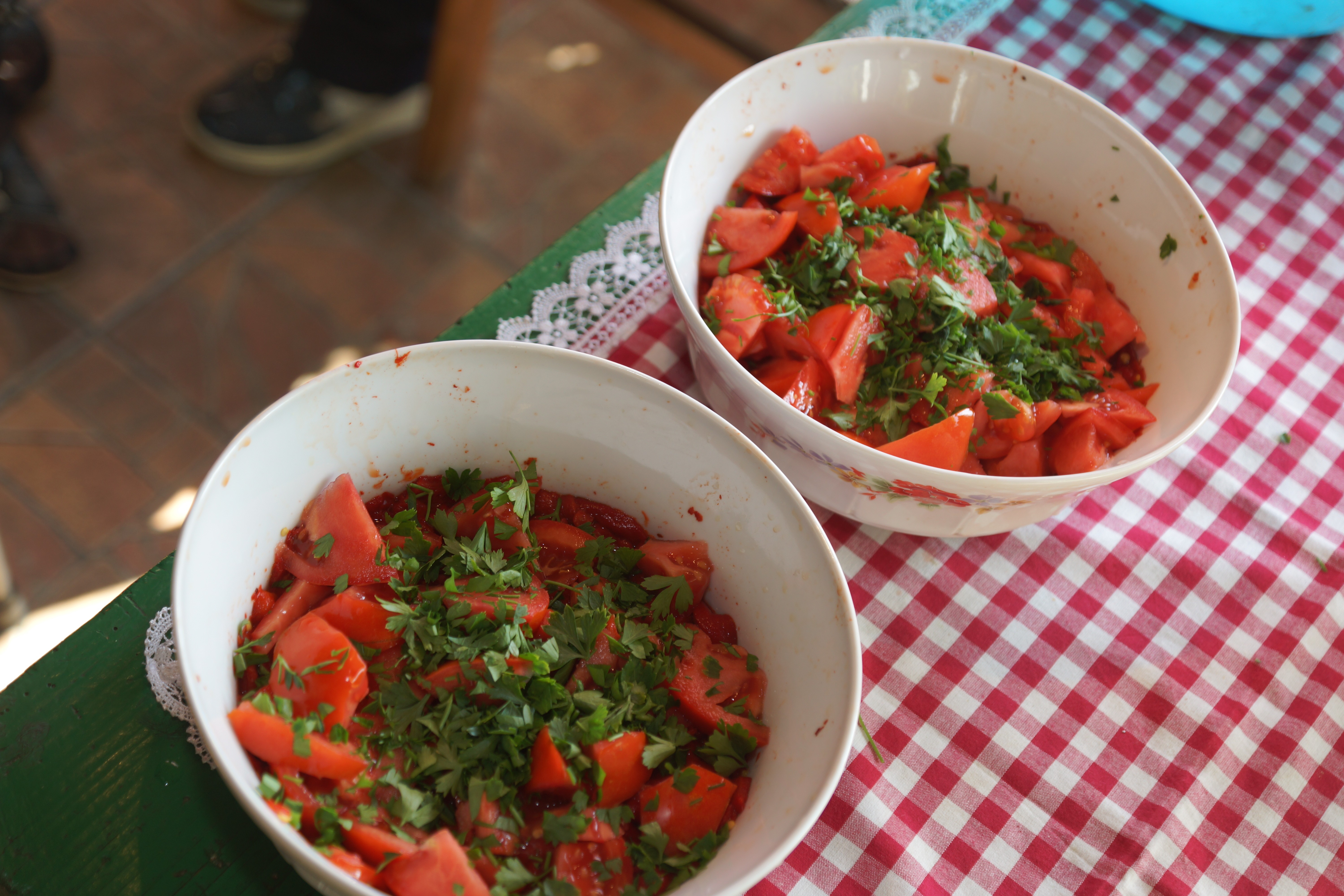 Selo Rogljevo Tradicionalna salata istočne Srbije